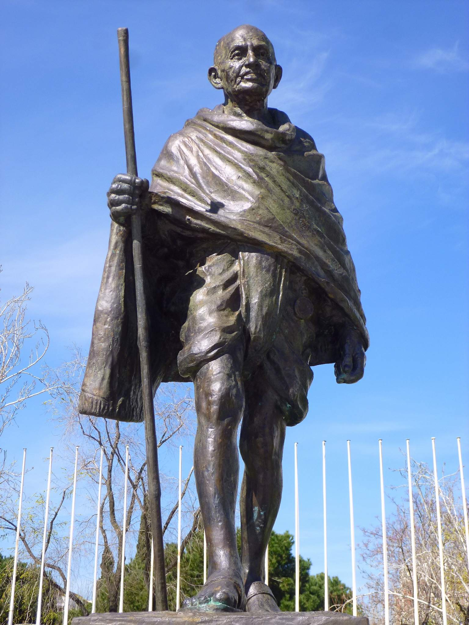 Madrid - Plaza Joan Miró, Monumento a Mohandas K. Gandhi